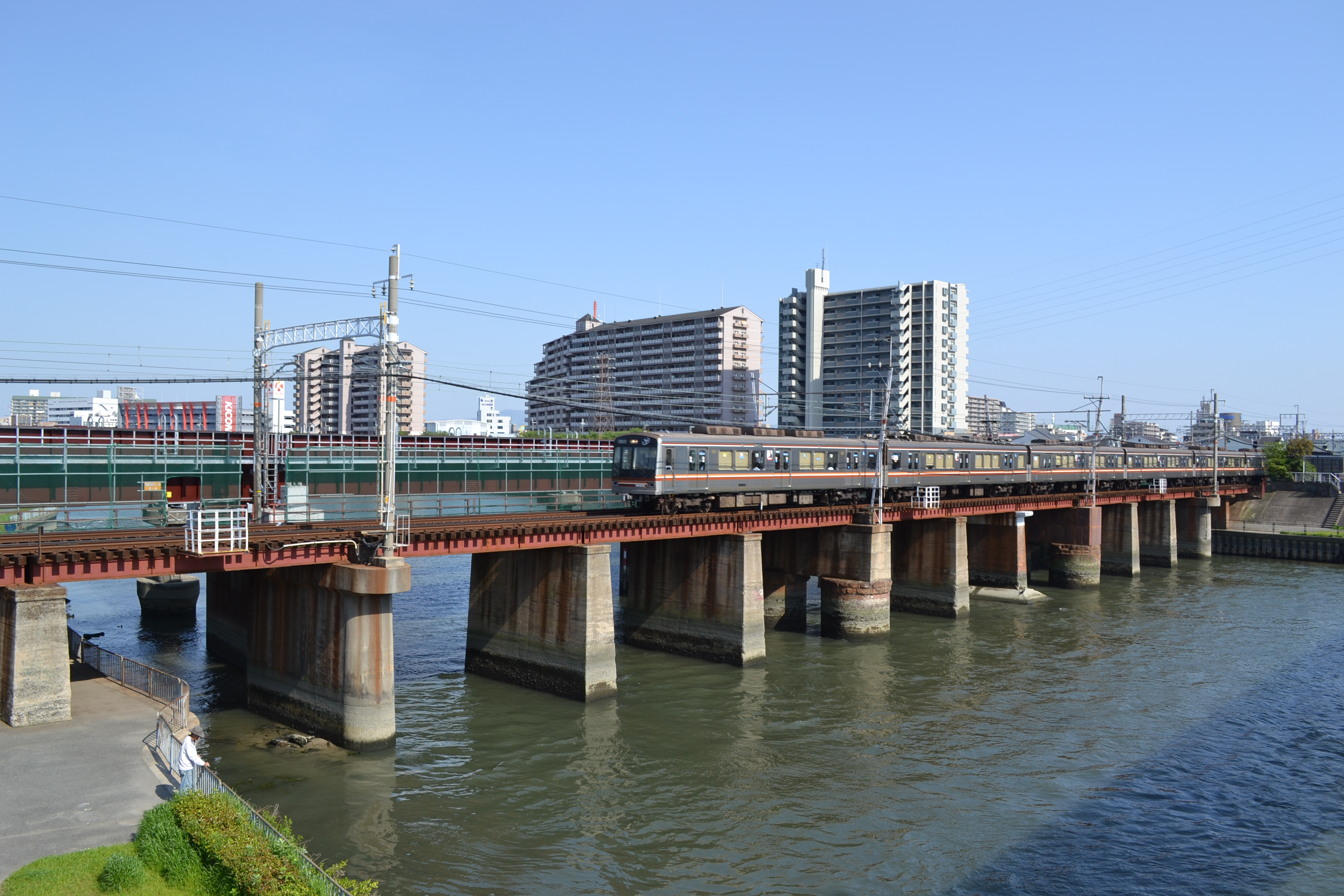 阪急千里線新神崎川橋梁